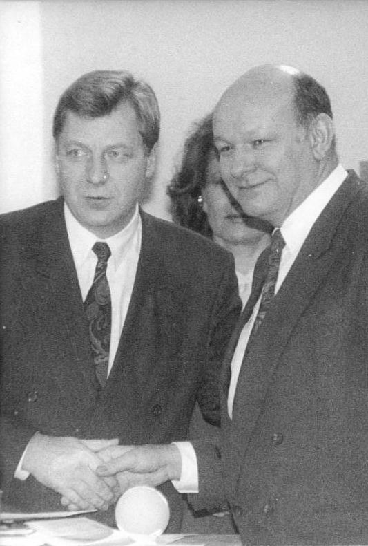 Berlin, Wahl zum Abgeordnetenhaus, Diepgen, Momper ADN-Grimm 27 2.12.90 Berlin: Wahlen. Der Regierende Bürgermeister Walter Momper (rechts), Verlierer der Wahlen für das Berliner Abgeordnetenhaus, gratuliert dem Berliner CDU-Chef Eberhard Diepgen zum klaren Erfolg seiner Partei, die nach dem gegenwärtigen Stand der Auszählung auf rund 40 Prozent der Stimmen kam. Die SPD hingegen erreichte nur etwa 30 Prozent. Es wird in der deutschen Hauptstadt also wieder einen Machtwechsel geben.